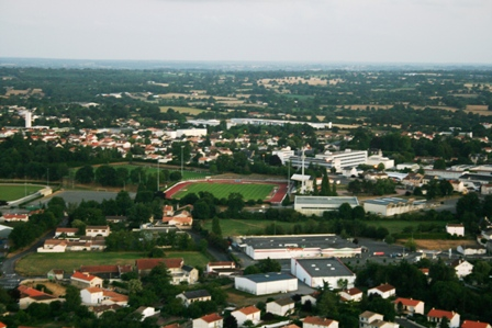 Français